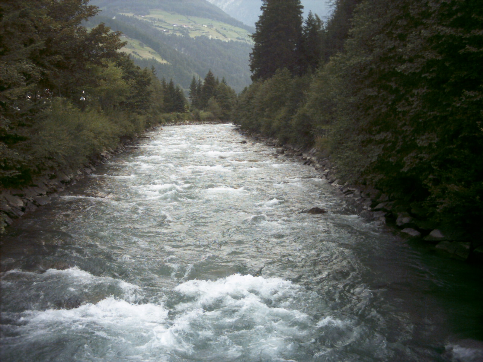 Torrente Aurino, in valle Aurina, Trentino Alto Adige, Italia